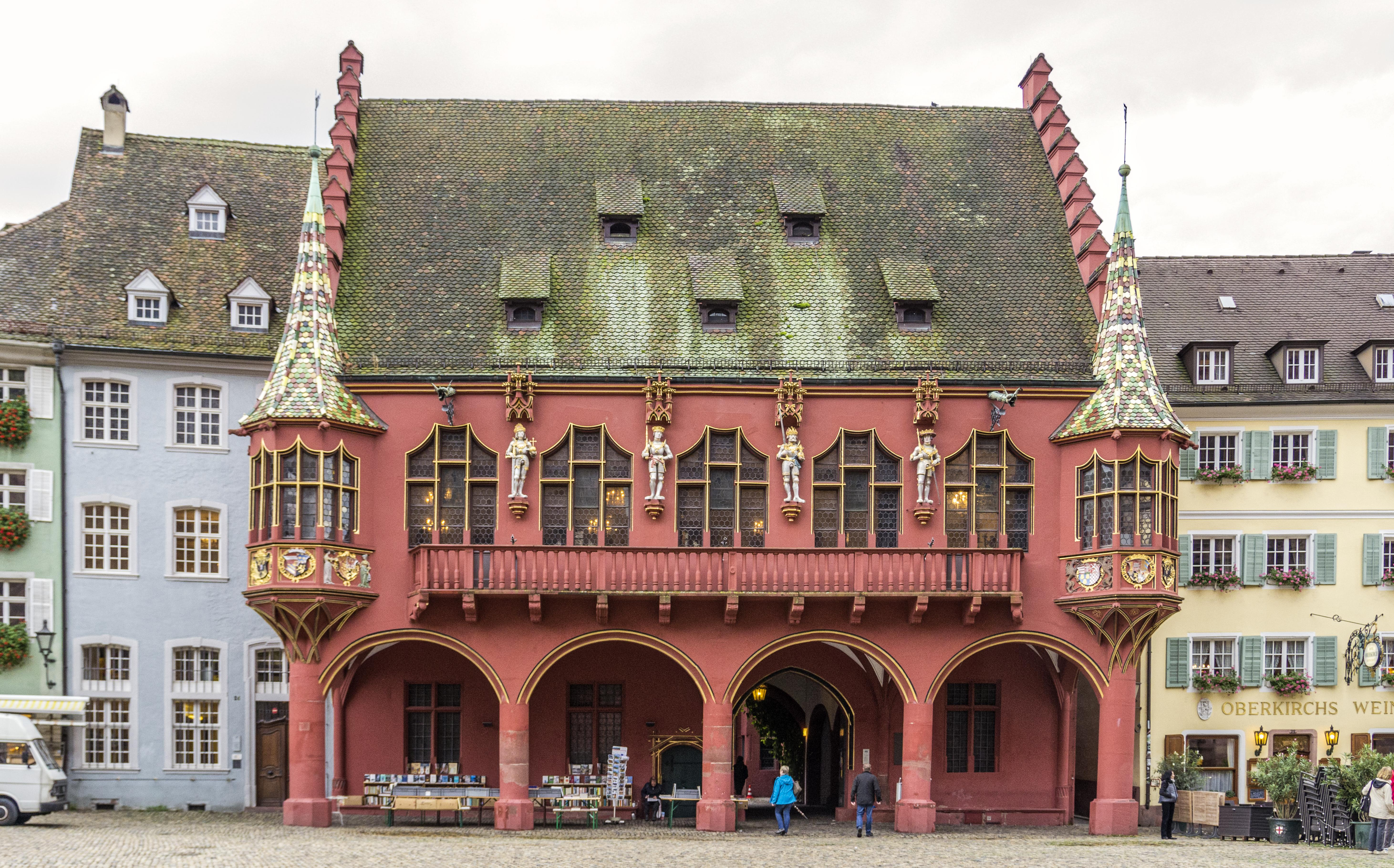 DFN Treffen am 12.09.2013 auf dem Freiburger Münsterplatz